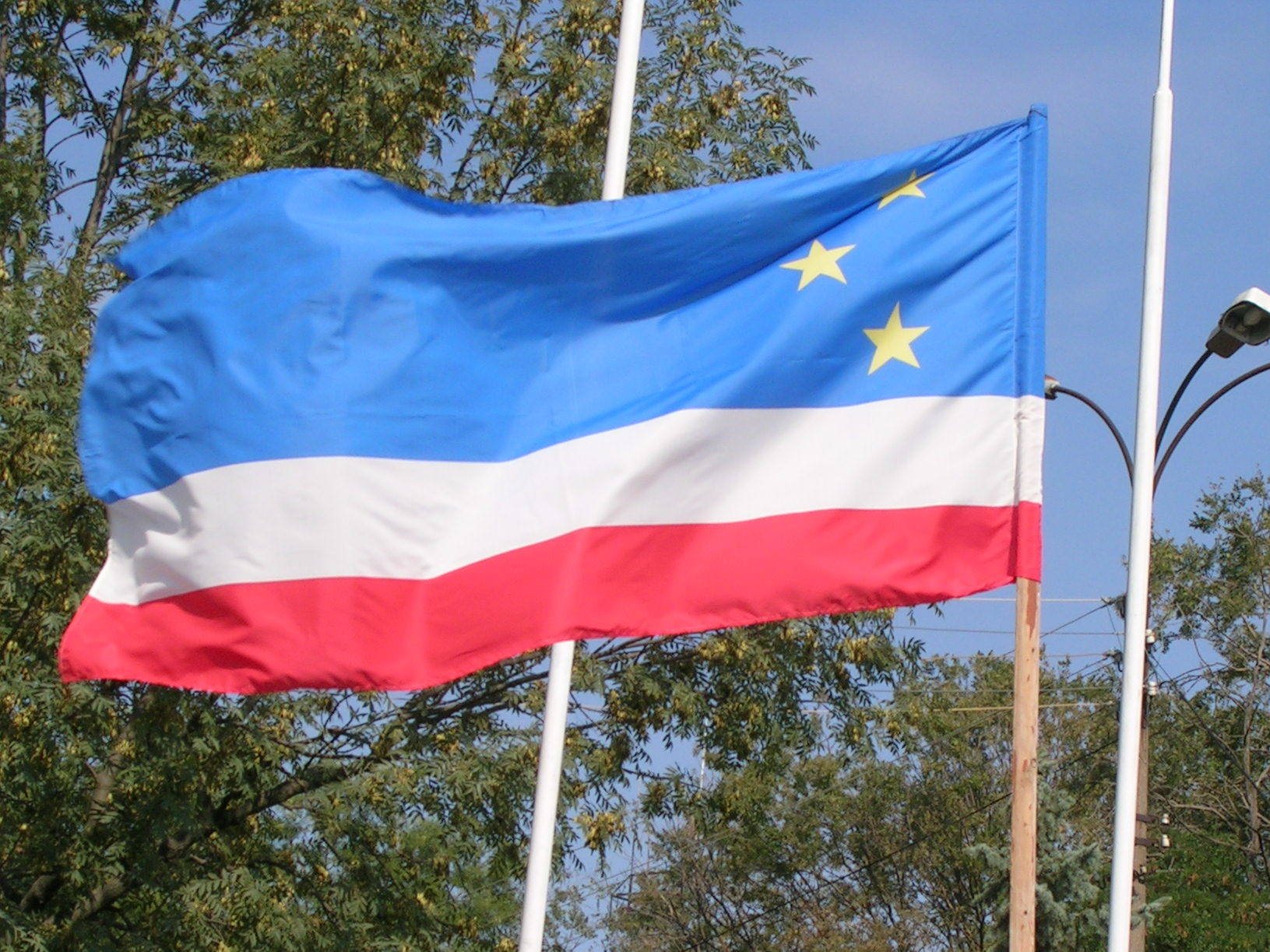 Флаг Гагаузии на Конгрессе гагаузов в 2009 году